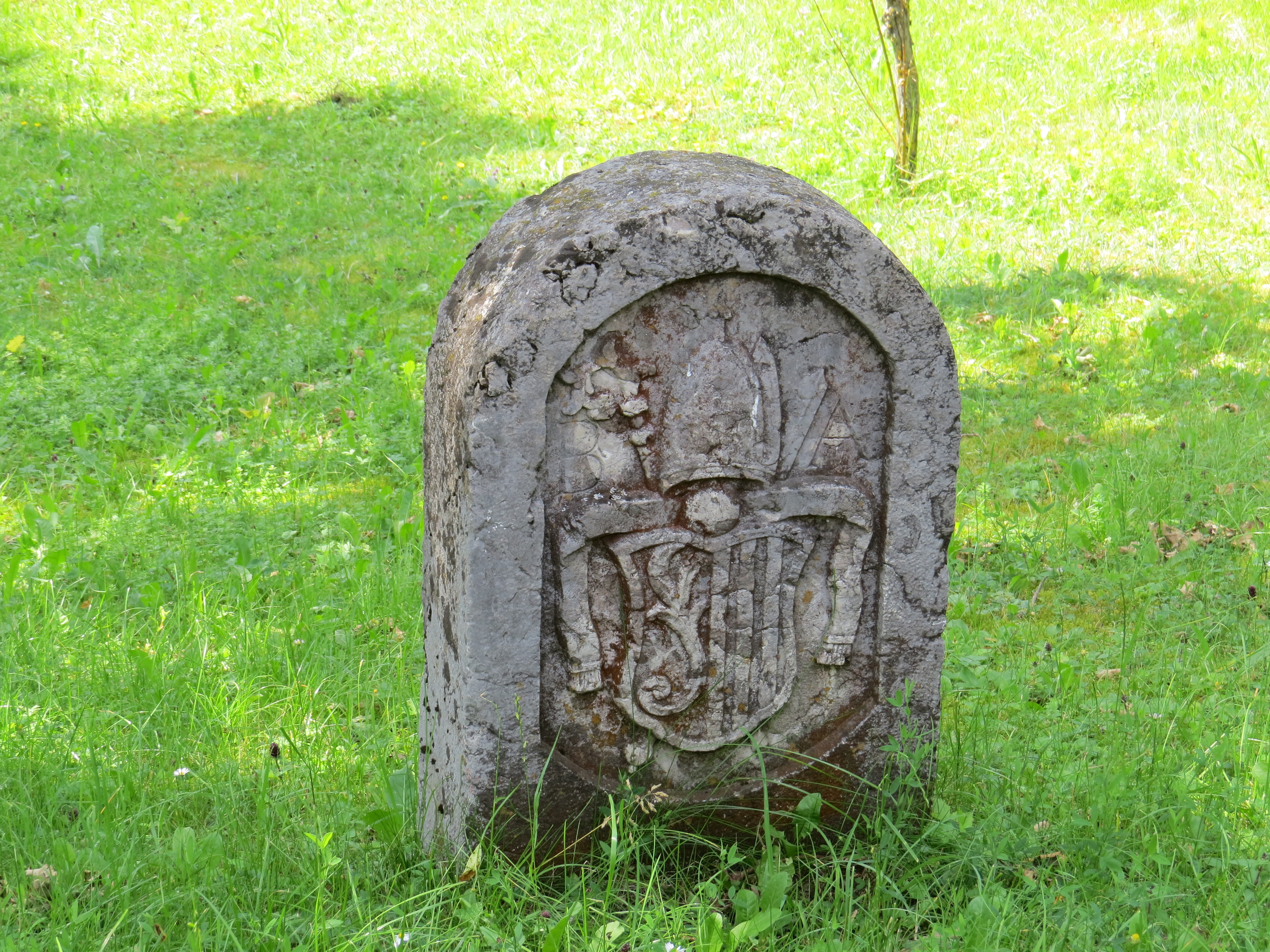 Grenzstein östlich von Waalhaupten, Waal